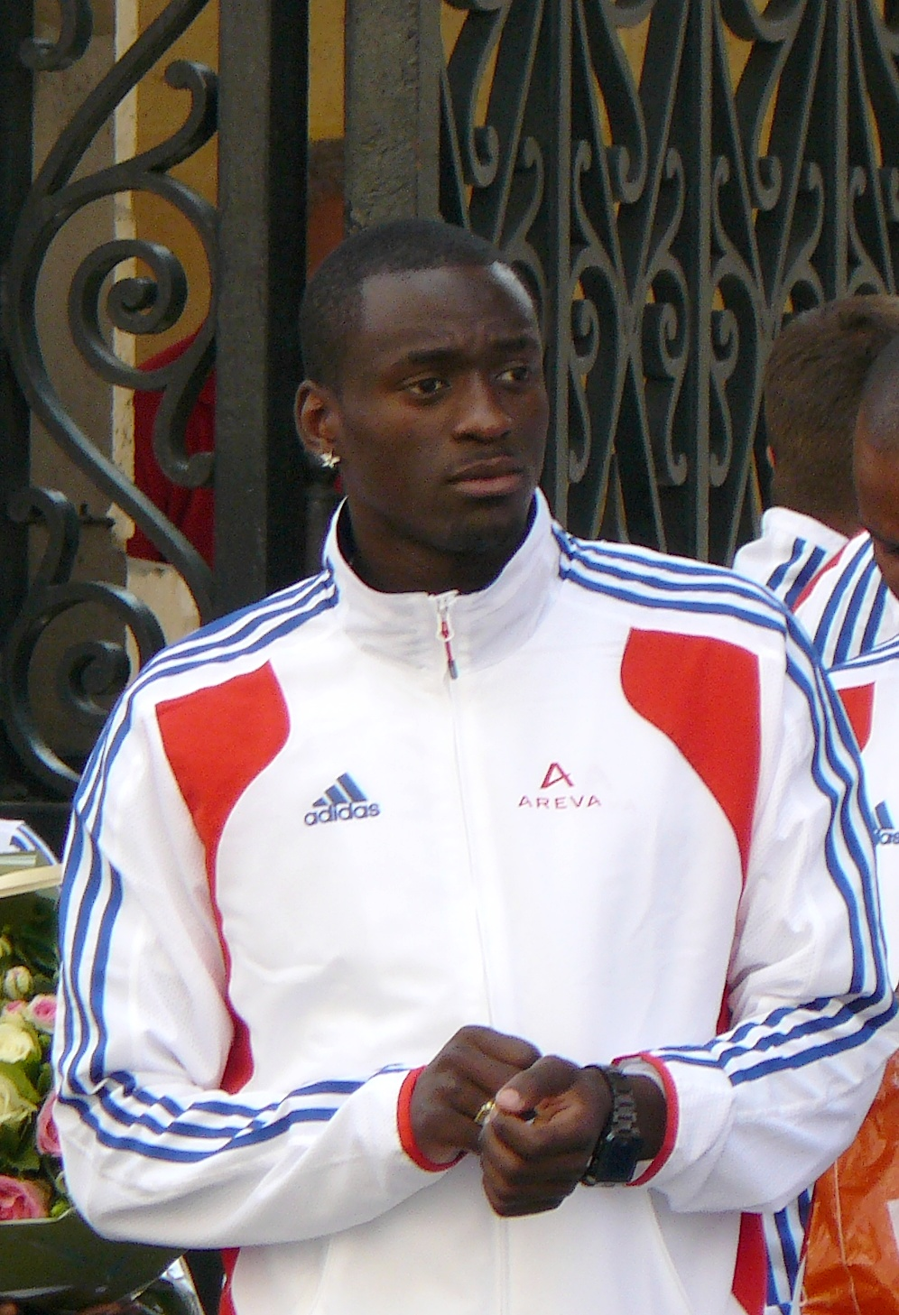 Teddy Tamgho, athlète français (triple saut), lors de la réception à l'Élysée des médaillés de Barcelone , le 3 août 2010.